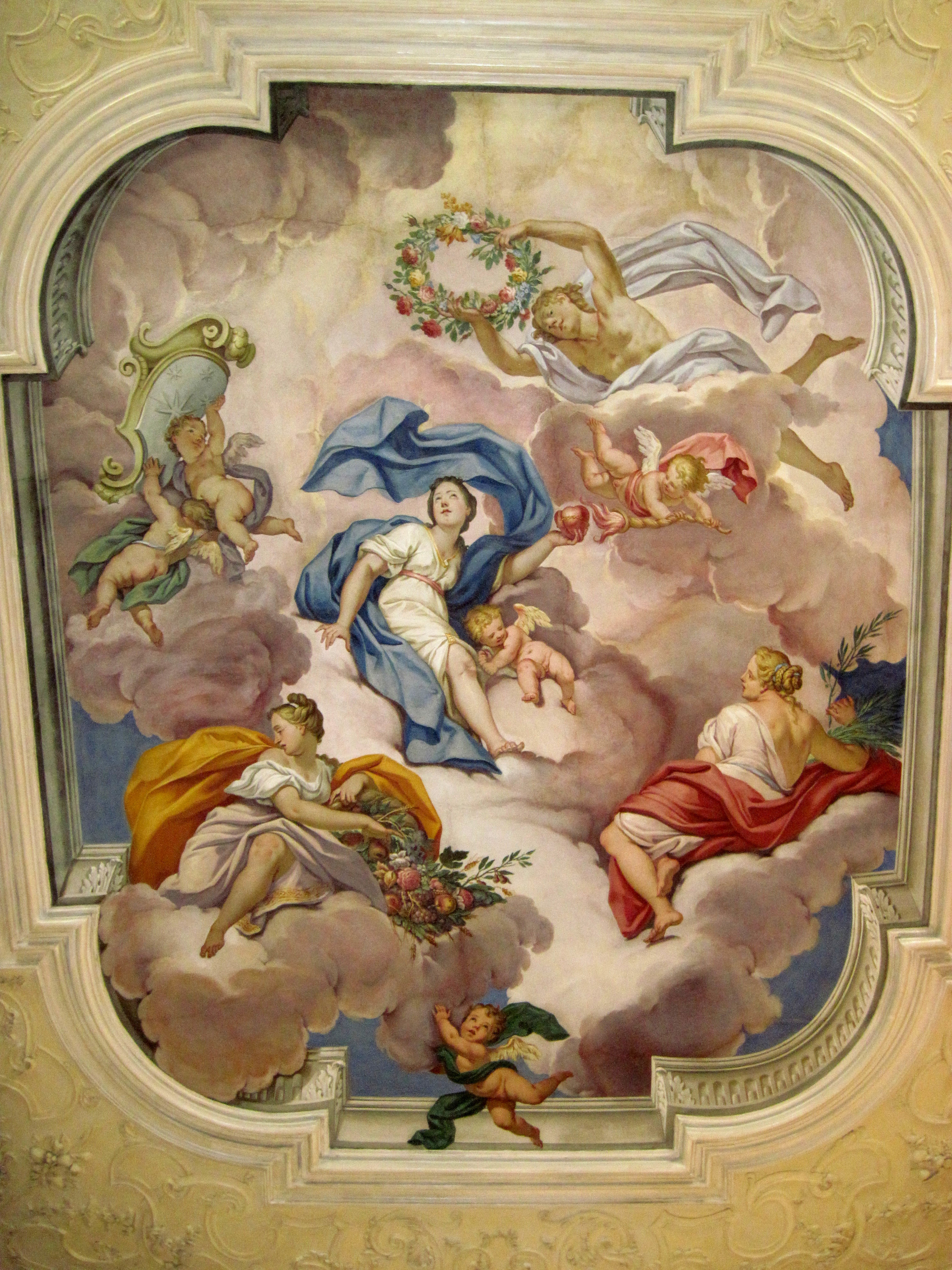 Palazzo Pizzini - Ala (TN) - Sala della Musica-Affresco di Antonio Gresta. This is a photo of a monument which is part of cultural heritage of Italy.